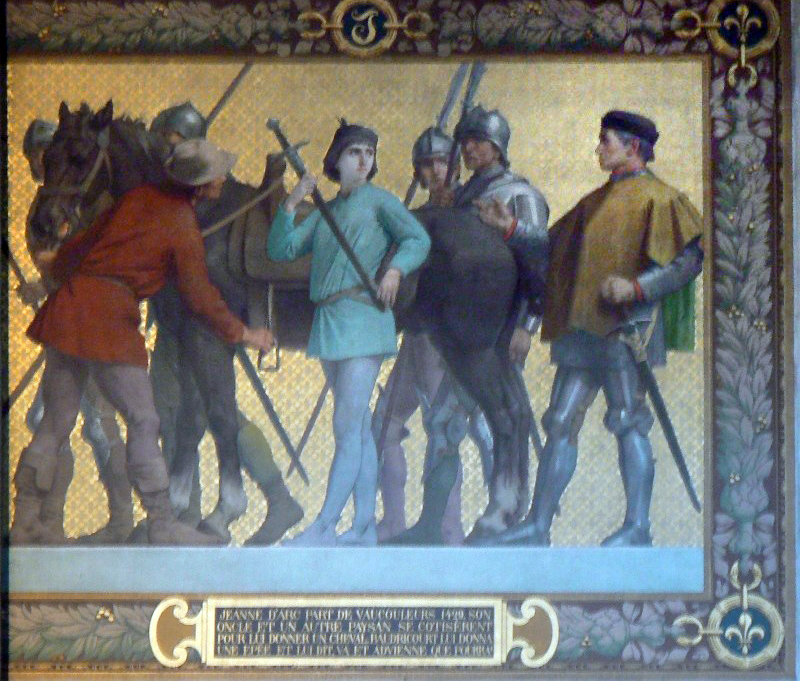 картина Жанна д'Арк в Вокулере